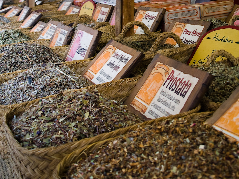 Imagen del Mercado Medieval Tres Culturas, celebrado en Aranda de Duero del 13 al 15 de marzo de 2009.